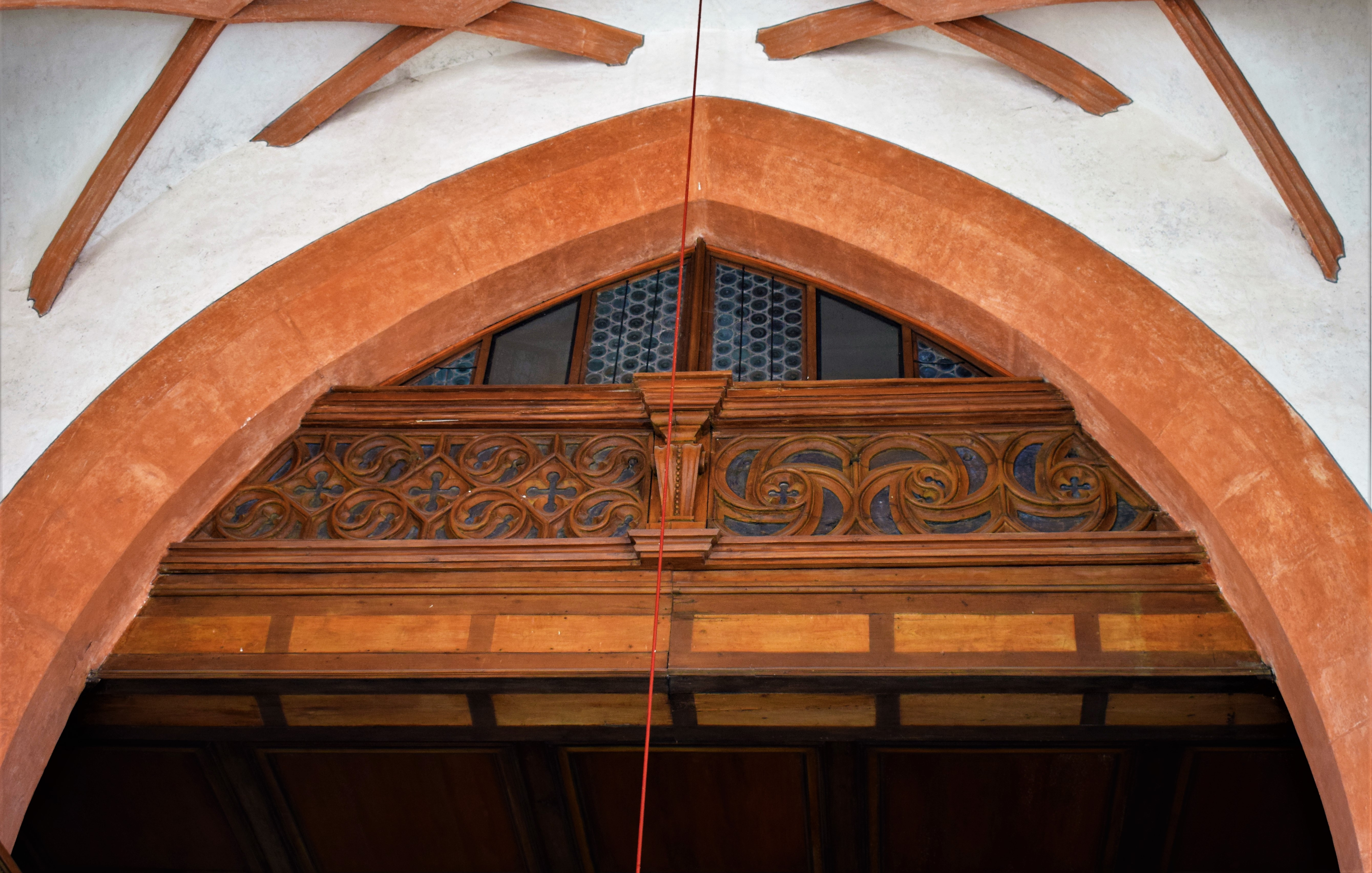 Rieterkirche Kalbensteinberg: In den Chorbogen einschneidende Langhausdecke von 1609/13 mit sechsteiligem Fenster und nachgotischer Brüstung